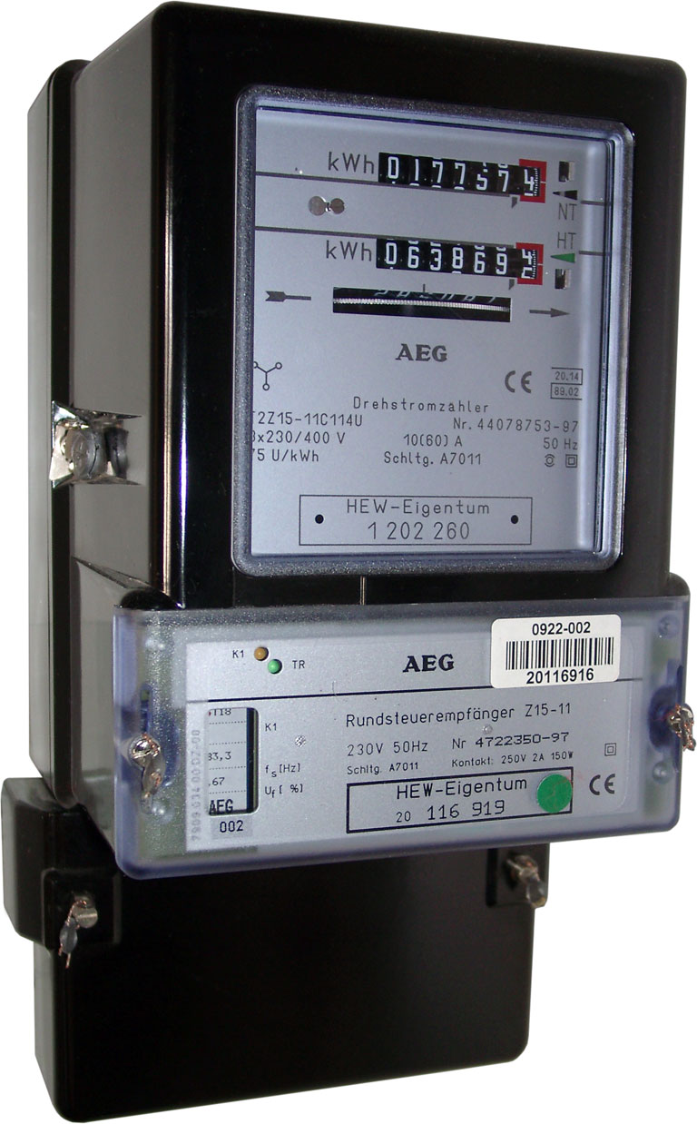 Drehstromzähler